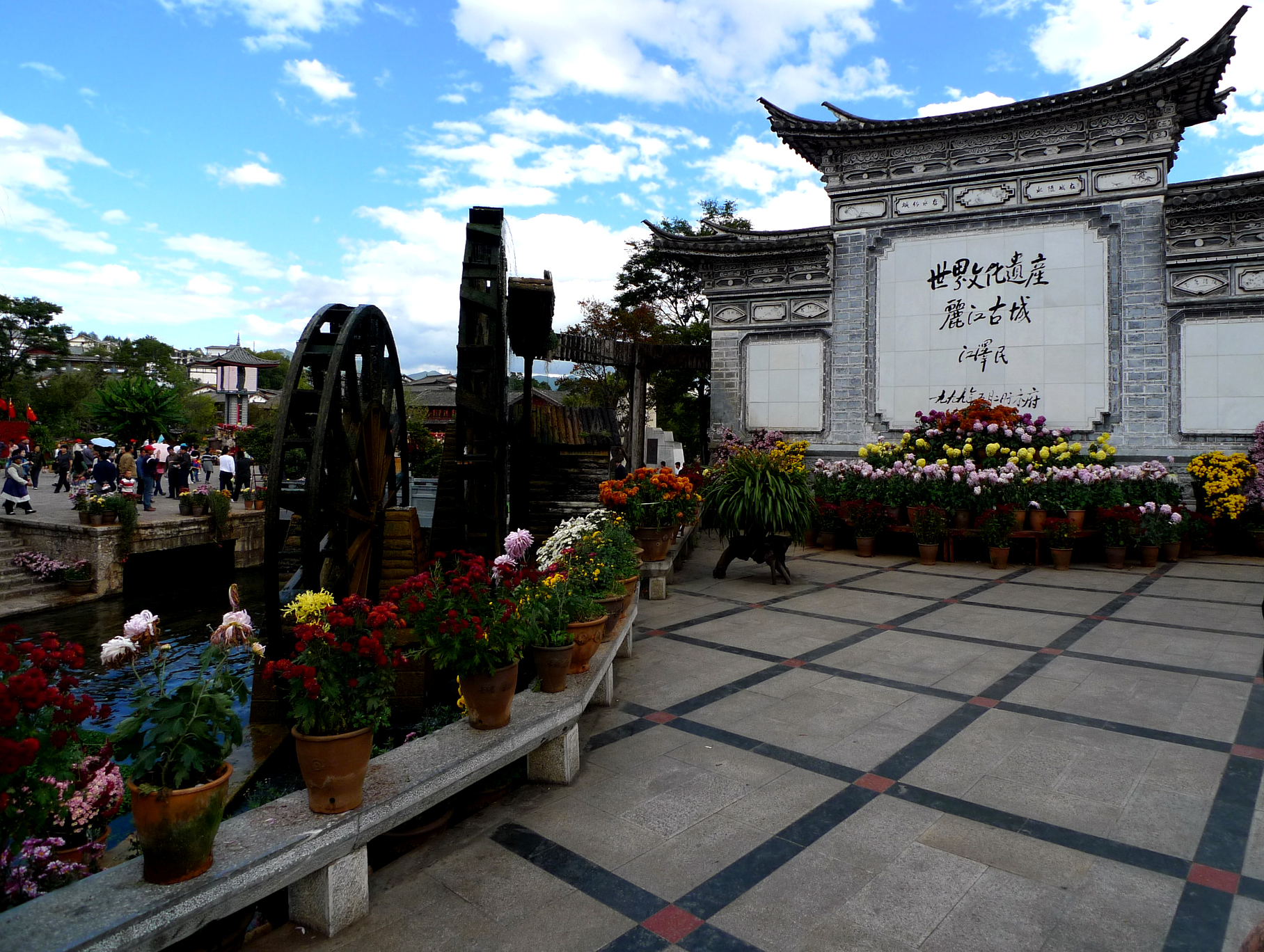 世界文化遗产丽江古城